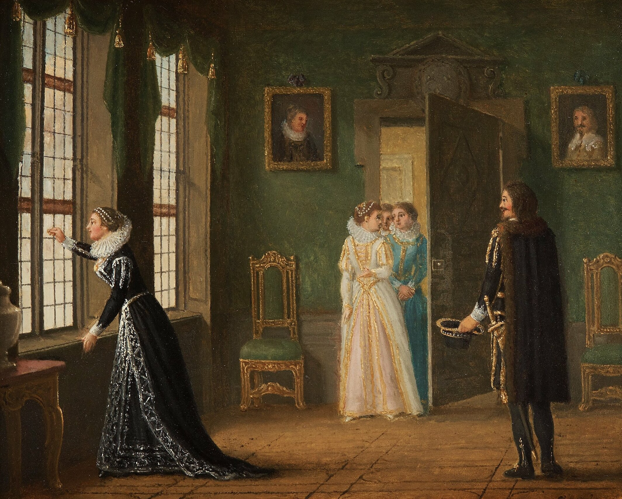 Ebba Brahes trolovning med Jacob de la Gardie. Målad av Pehr Hilleström.